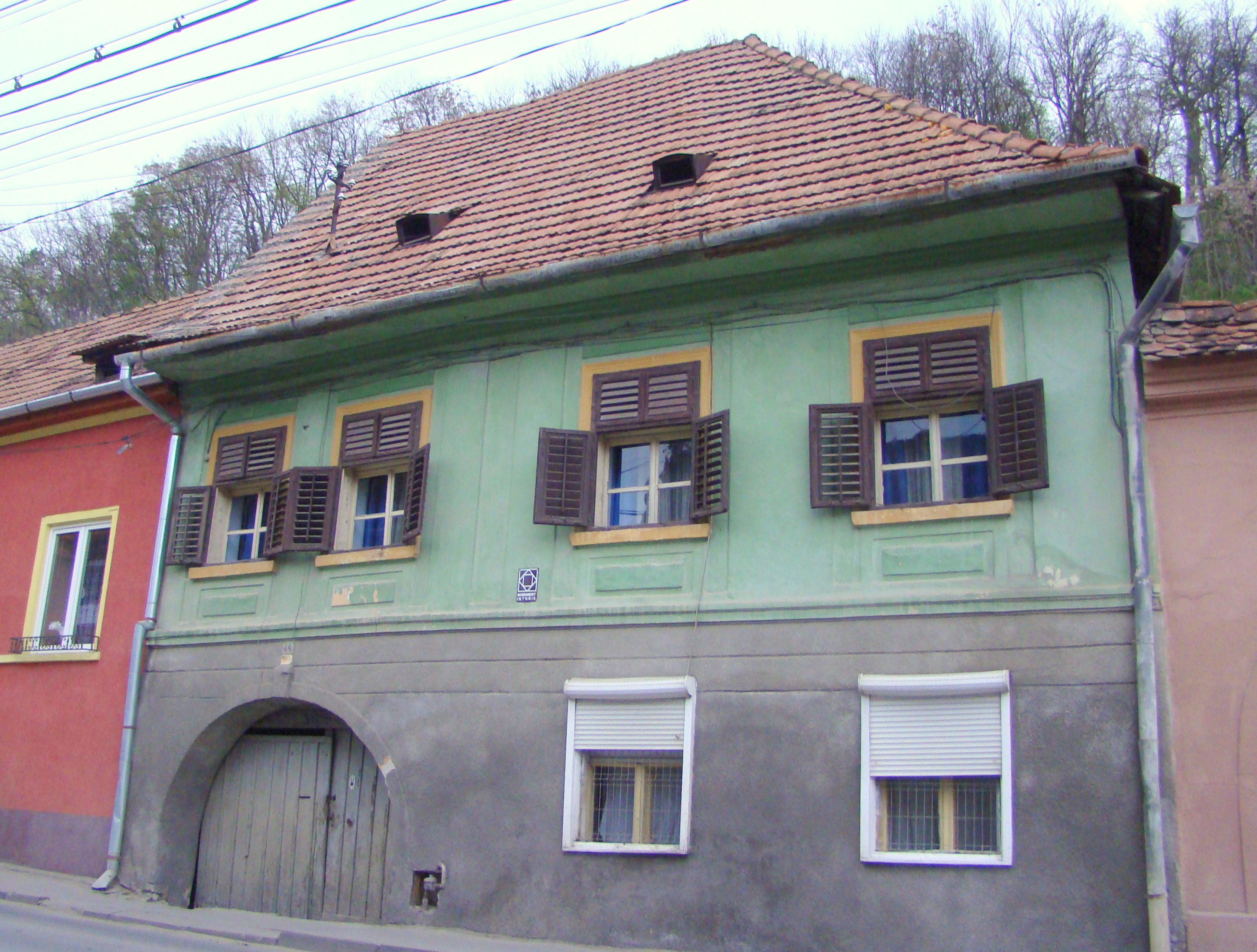 Casă, municipiul Sighișoara, str. Chendi Ilarie 44 1780 - 1820